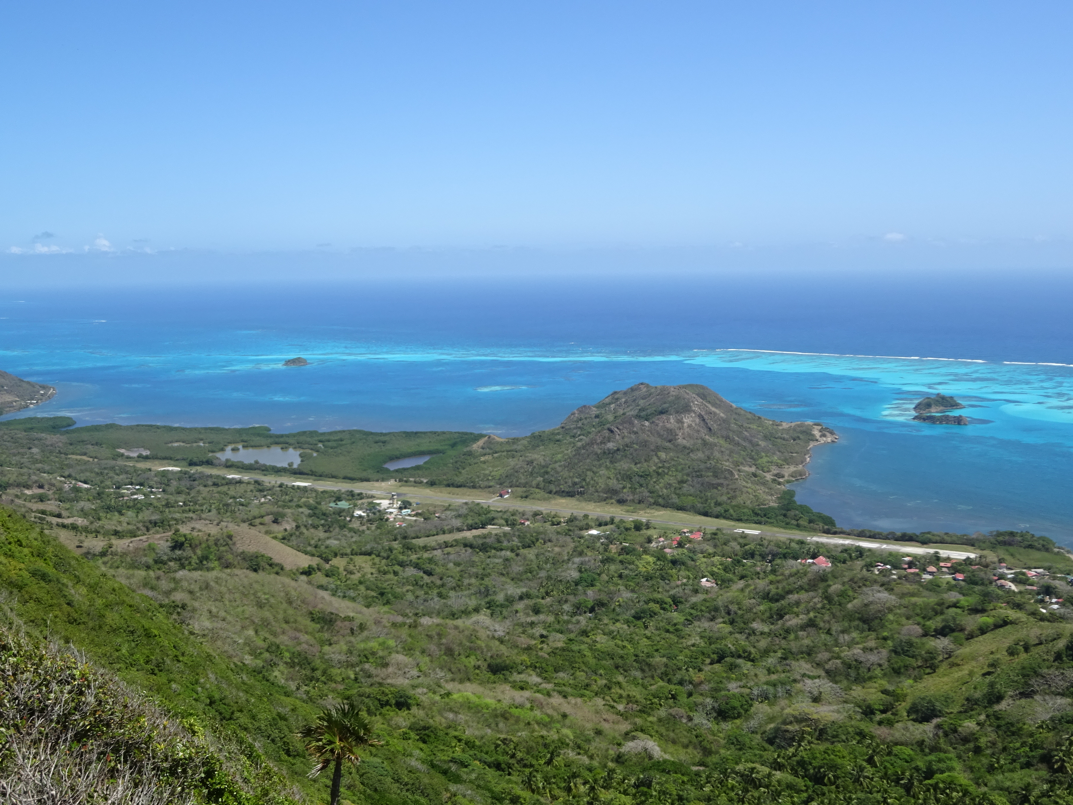 El parque nacional natural Old Providence McBean Lagoon junto al aeropuerto El Embrujo en la isla de Providencia.